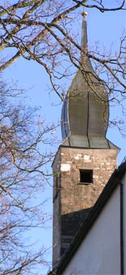 Stadt Regen, Pfarrkirche, romanischer Turm, selbst fotografiert am 25.12.2004